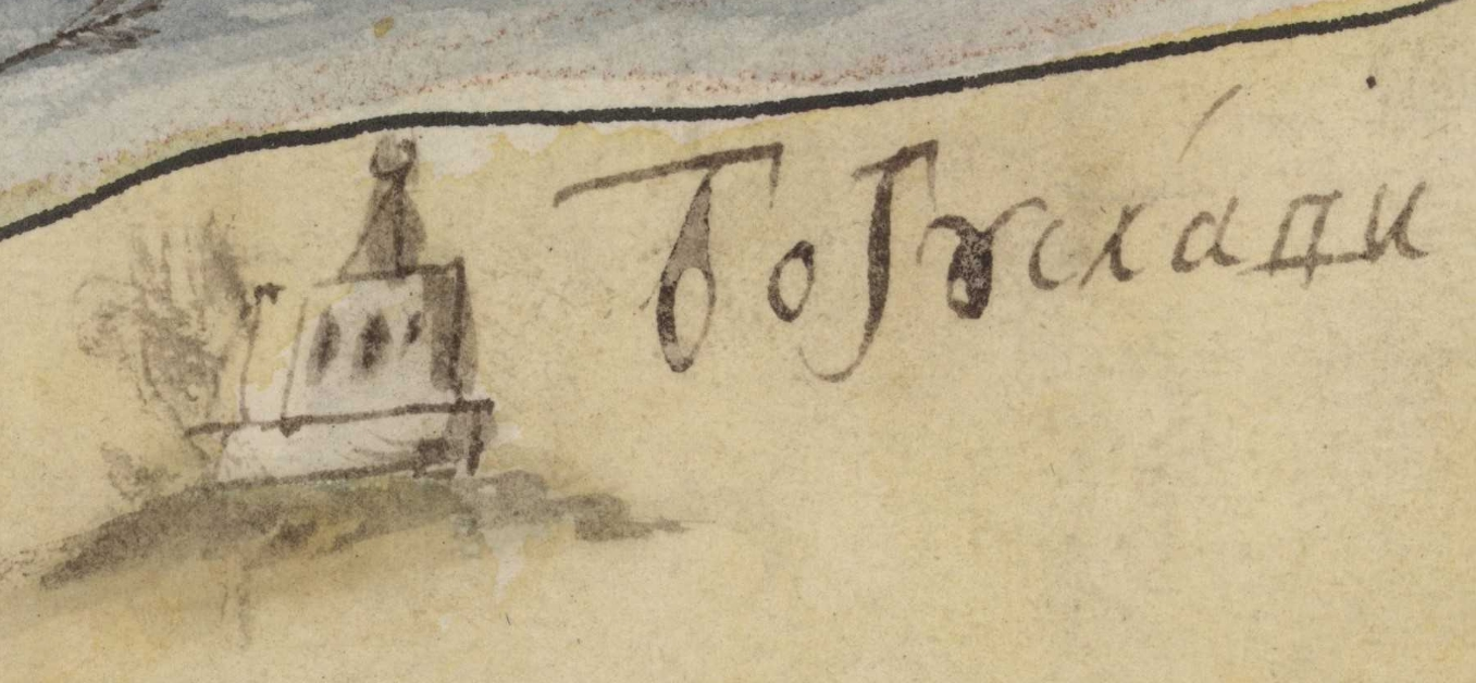 Фрагмент карти Київської губернії. XVIII століття. РГАДА, ф. 192, оп. 1, Киевская губ., № 5.